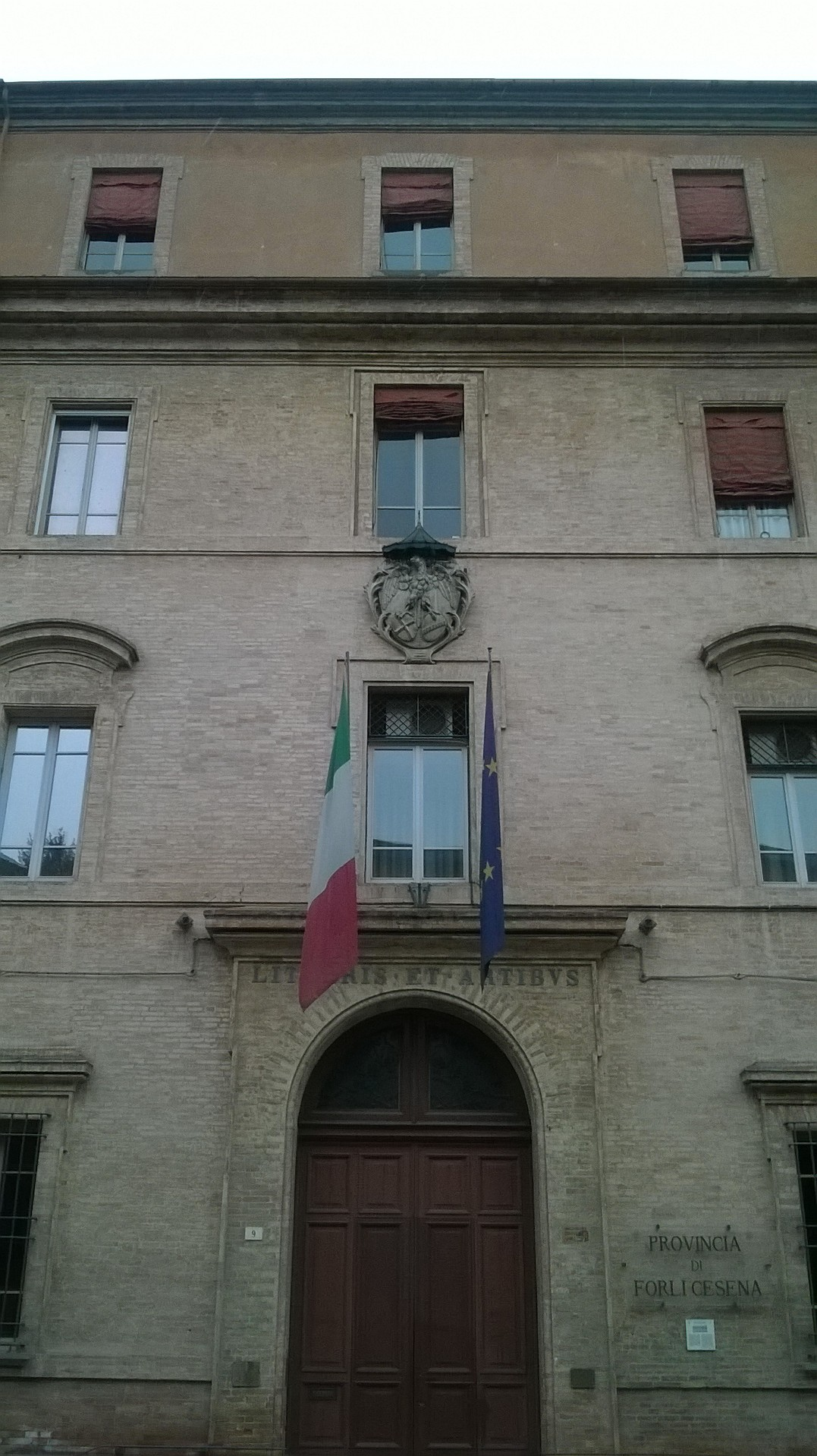 Il Palazzo dei Signori della Missioni a Forlì, sede del Palazzo della Provincia